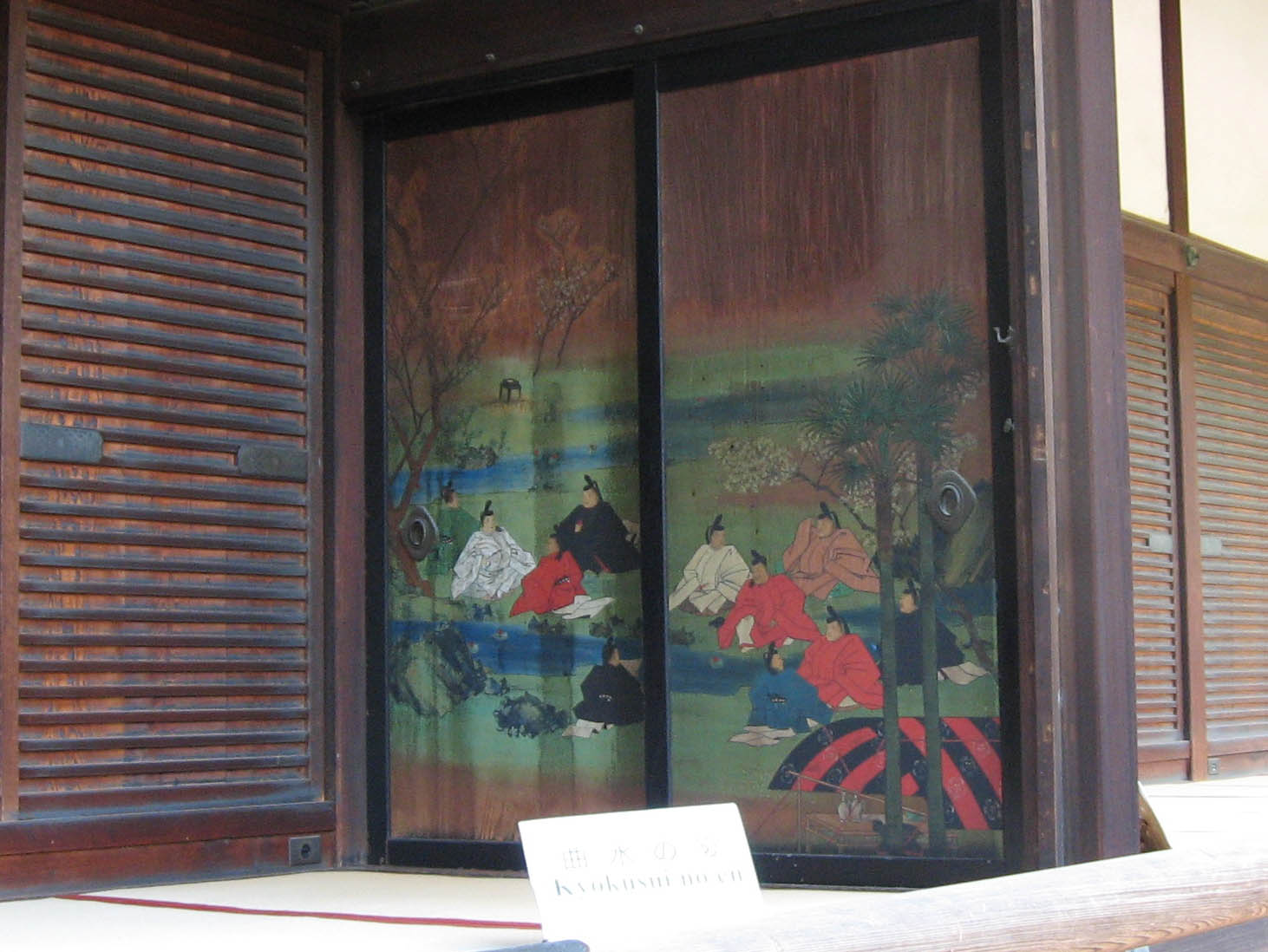 Gokusui no En 御常御殿のふすま絵に描かれた曲水の宴（京都御所）